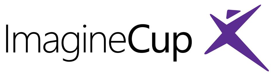 Oficjalne logo ImagineCup